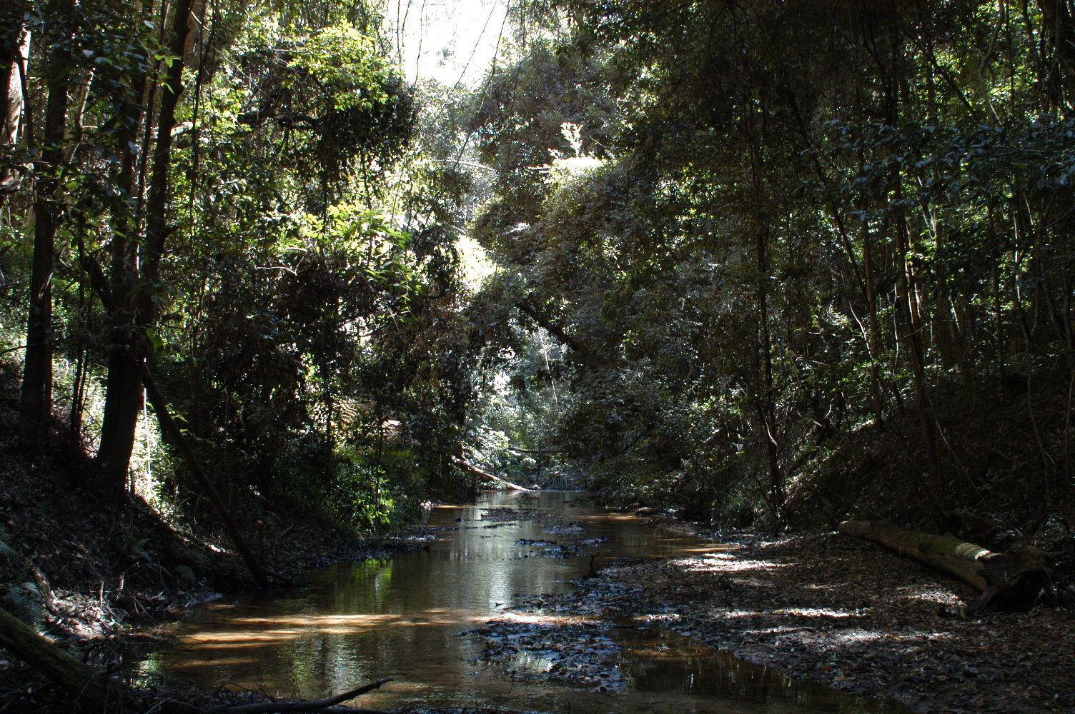 Ourimbah Creek 1